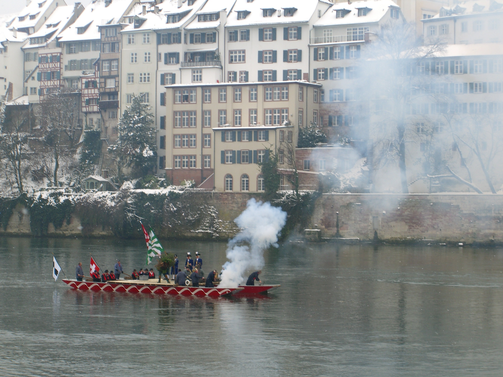 Kleinbasler Volksfest «Vogel Gryff». Rheinfahrt des Wilden Mannes, der zu Trommelmusik tanzt. Der Rauch stammt von Böllerschüssen.